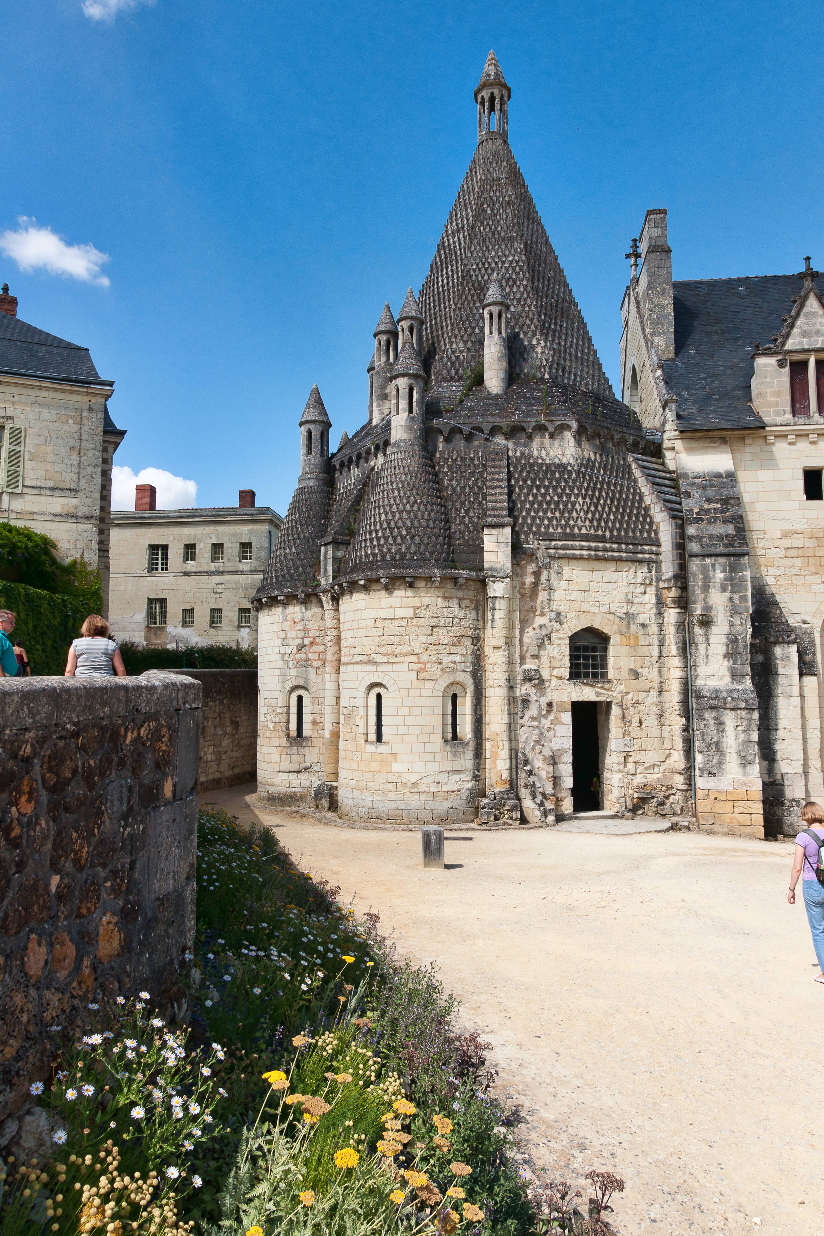 Abbaye Fontevraud - Cuisines